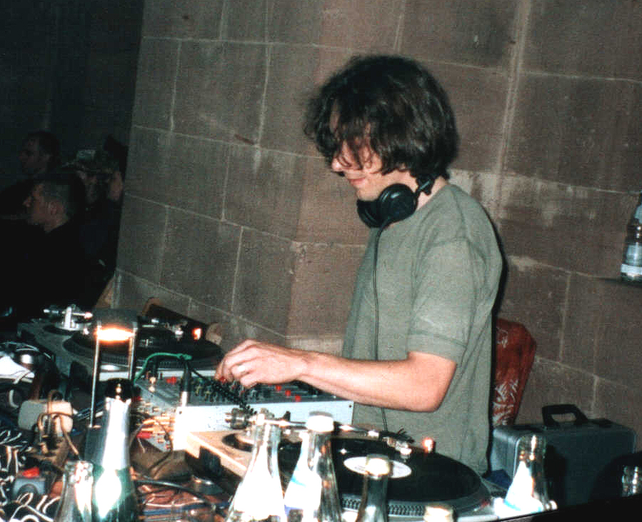 David Moufang, Alias Move D auf dem Maskenball des Veranstaltungskollektivs Harlequins Universe auf der Reichsburg Trifels